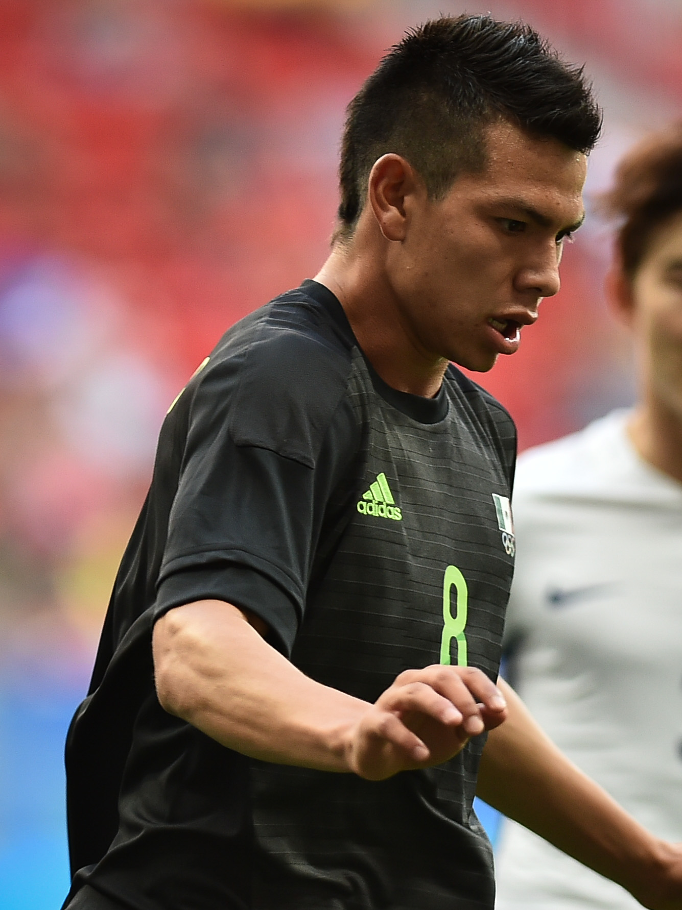 Estádio Nacional de Brasília Mané Garrincha, Brasília, DF, Brasil, 10/8/2016 Foto: Andre Borges/Agência Brasília. O time da Coréia do Sul classificou-se para a próxima fase do torneio de futebol masculino da Olimpíada com uma vitória por 1 a 0 contra o México. Kwon Chang-hoon marcou o gol da vitória sul-coreana aos 32 minutos do segundo tempo.